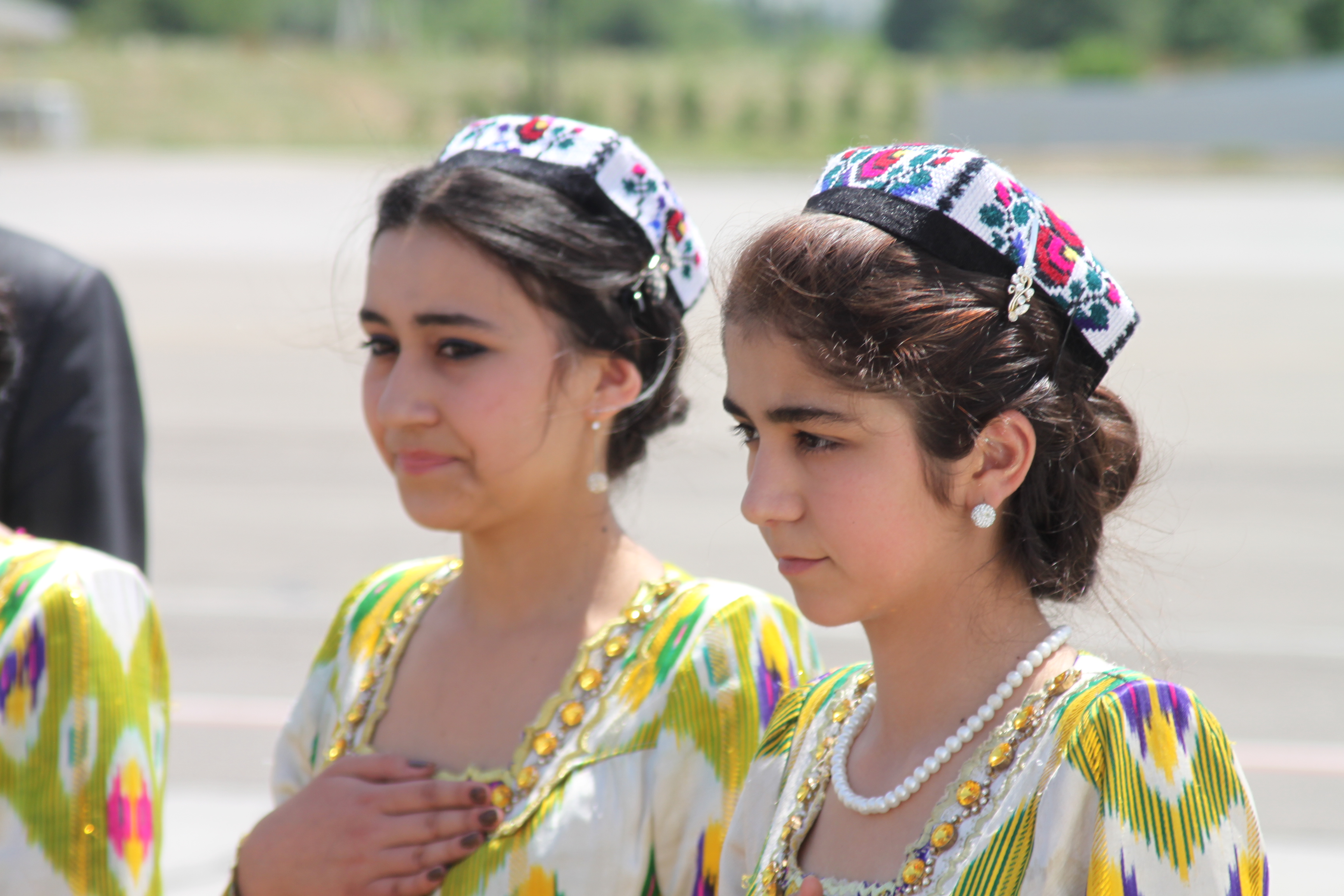 Dushanbe Tajik girls 187